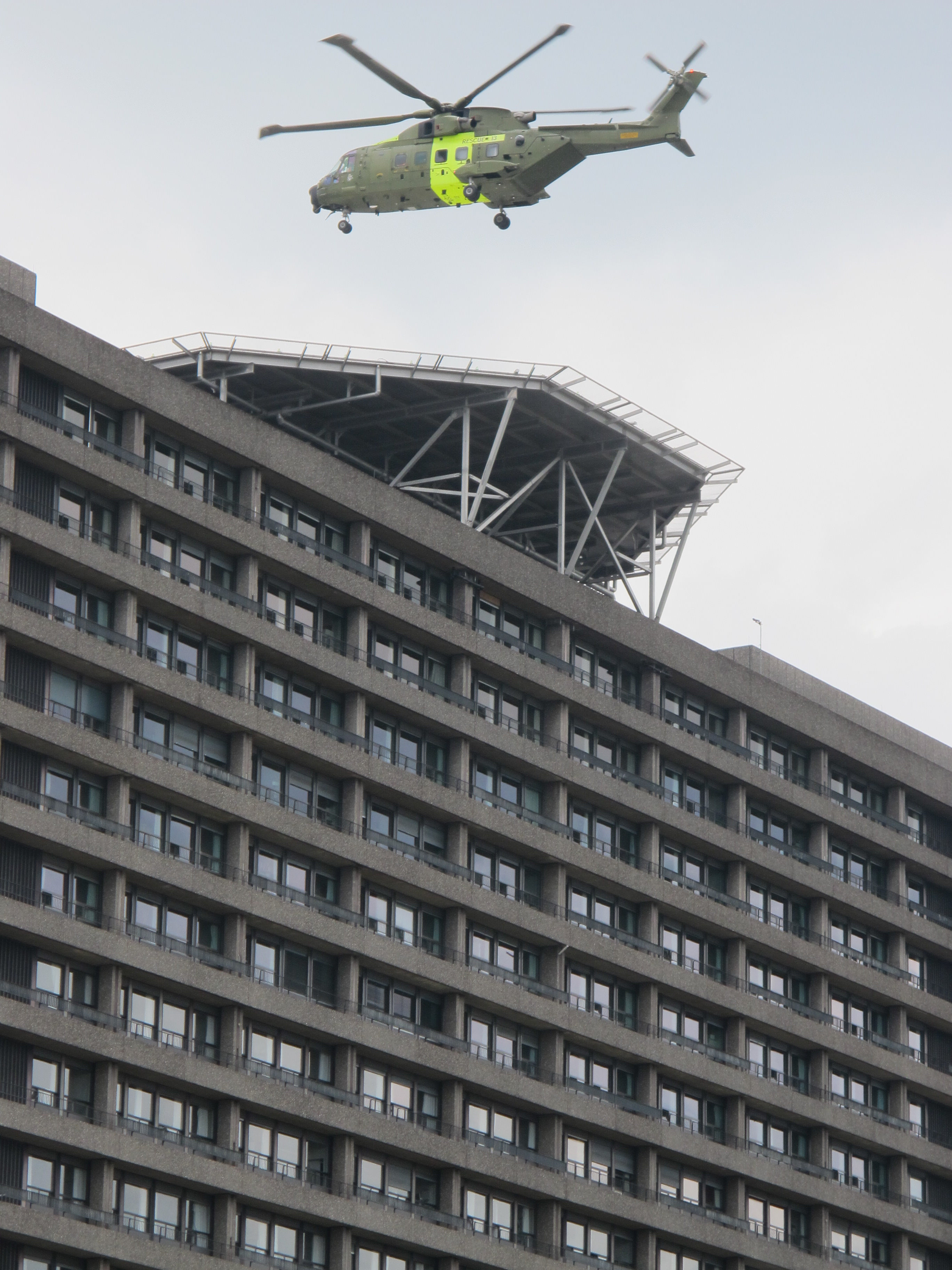 Takeoff